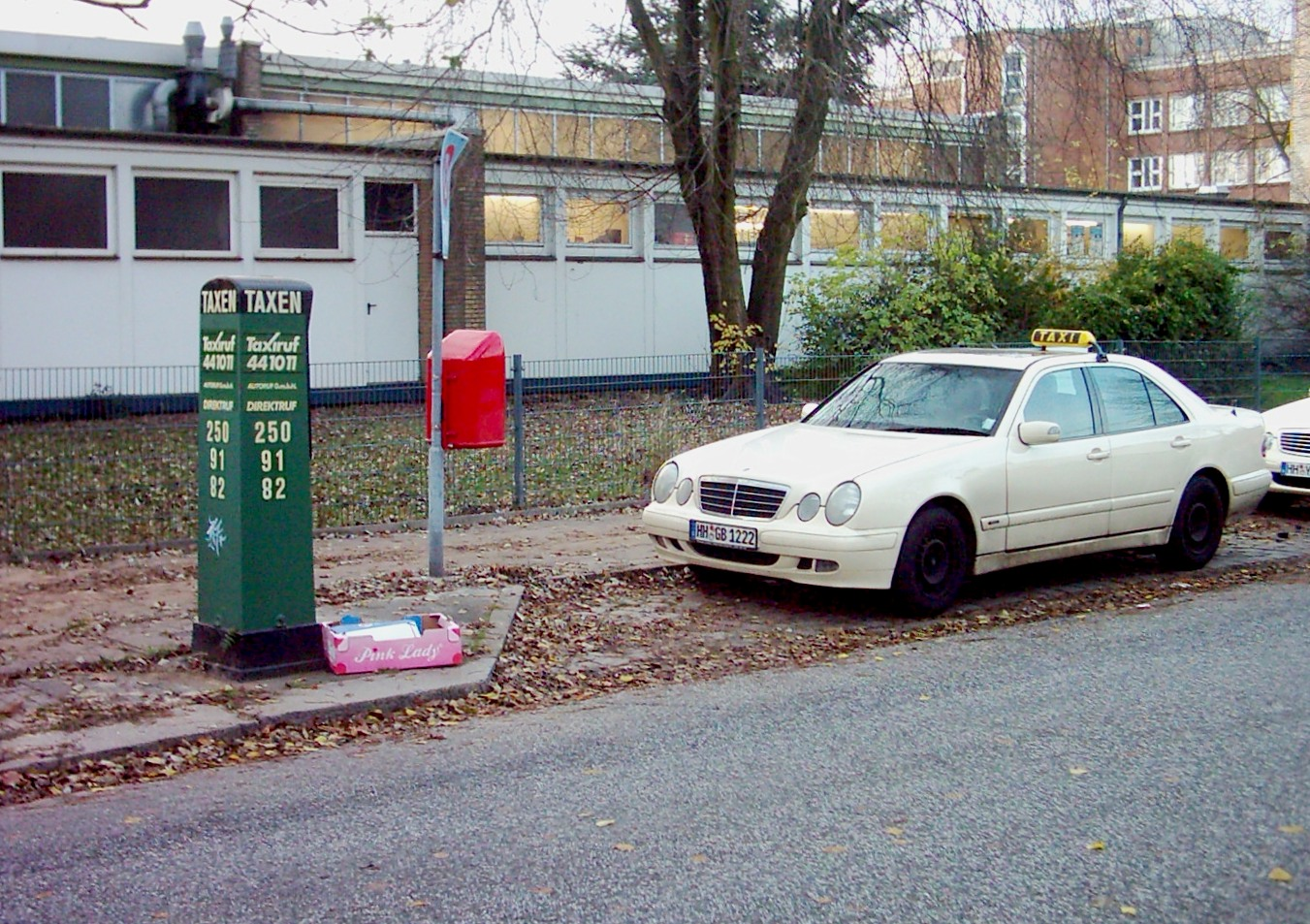 Taxenstand mit Rufsäule in Hamburg-Hammerbrook.